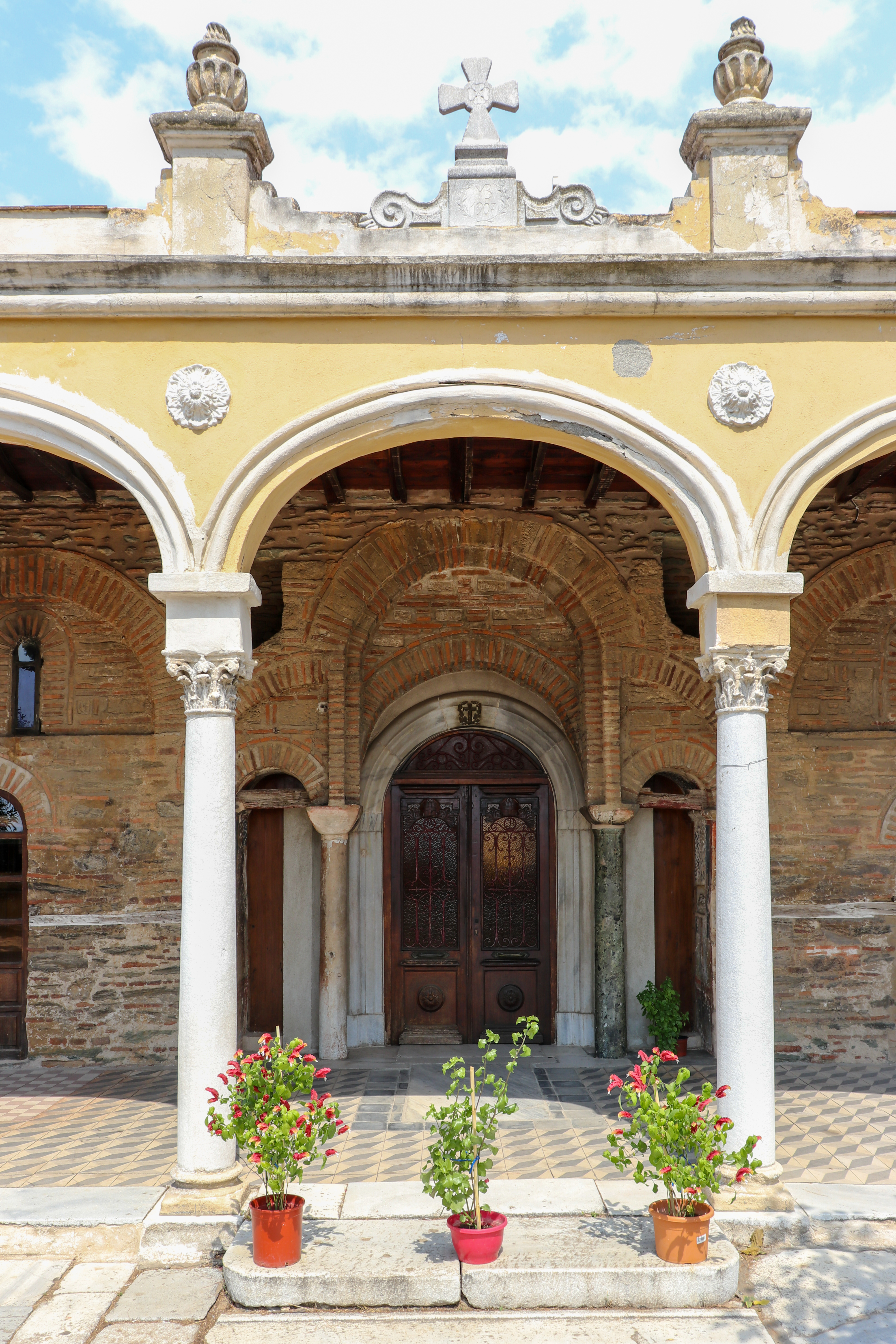 Монастырь Влатадон